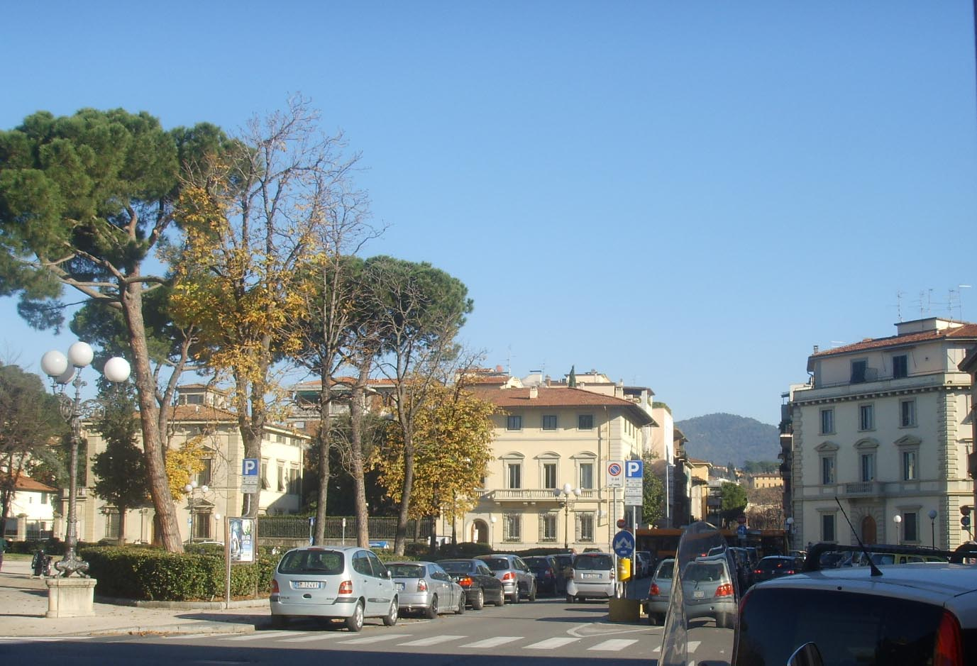 Piazza_savonarola in Florence, Italy